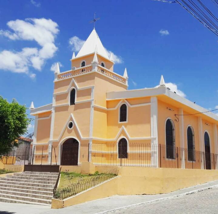 Vista interna da Igreja Matriz de Laje Grande, concluída em 2015.